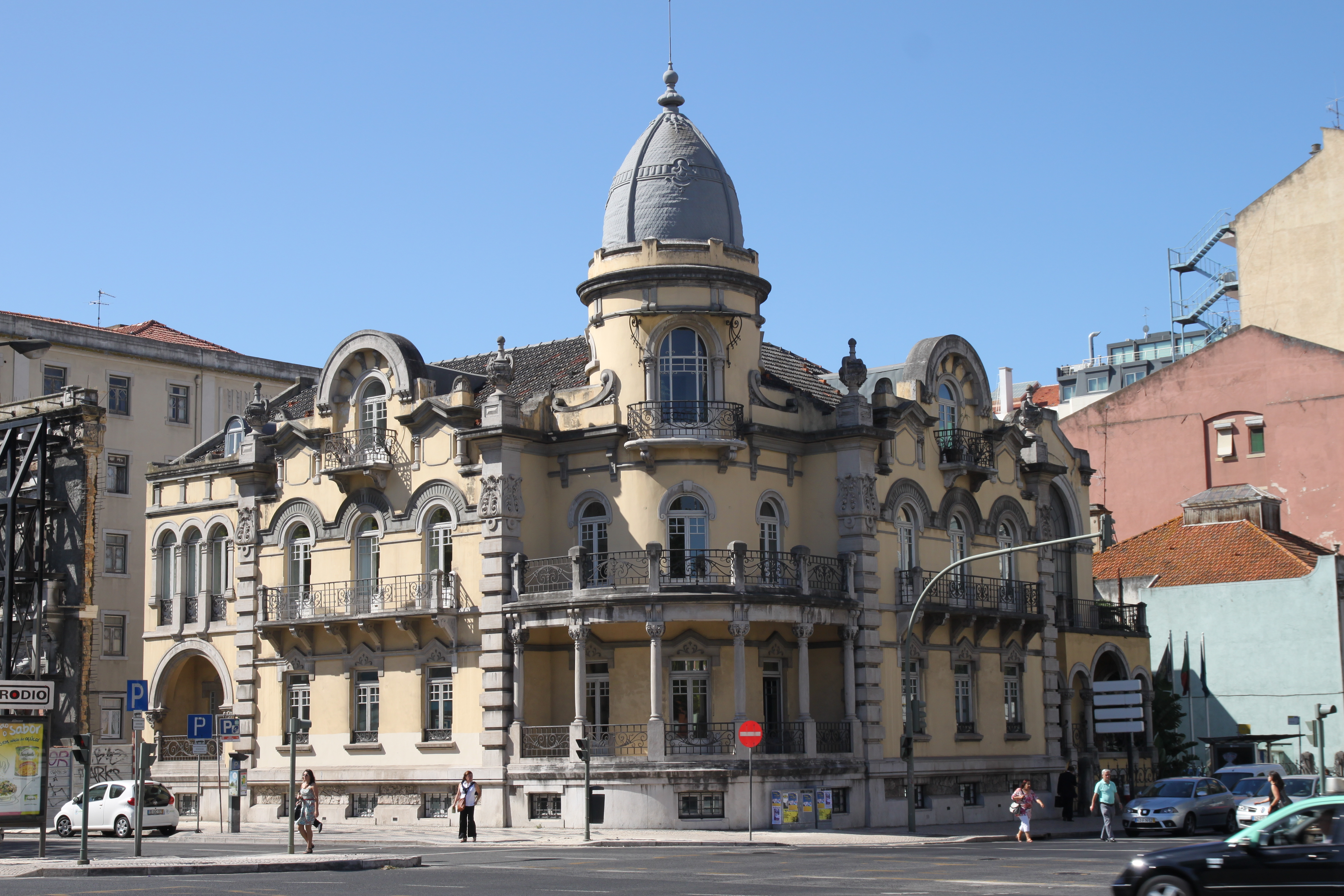 Edifício na Avenida da República e na Avenida de Berna, 1/1-A This building is classified as Imóvel de Interesse Público. This monument is classified as Imóvel de Interesse Público. This file was uploaded for Wiki Loves Monuments in Portugal with the unique identifier 74183.